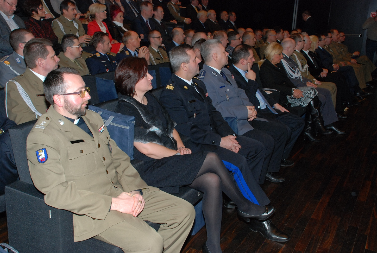 Szczecin, 05.12.2014 r. 70-lecie 109 Szpitala Wojskowego